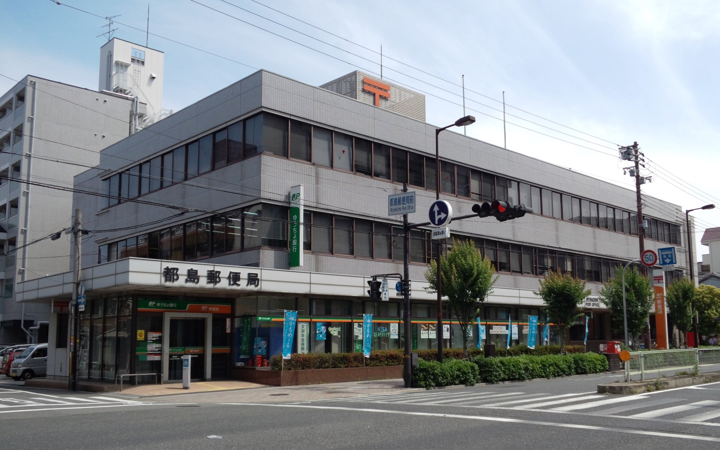 都島郵便局